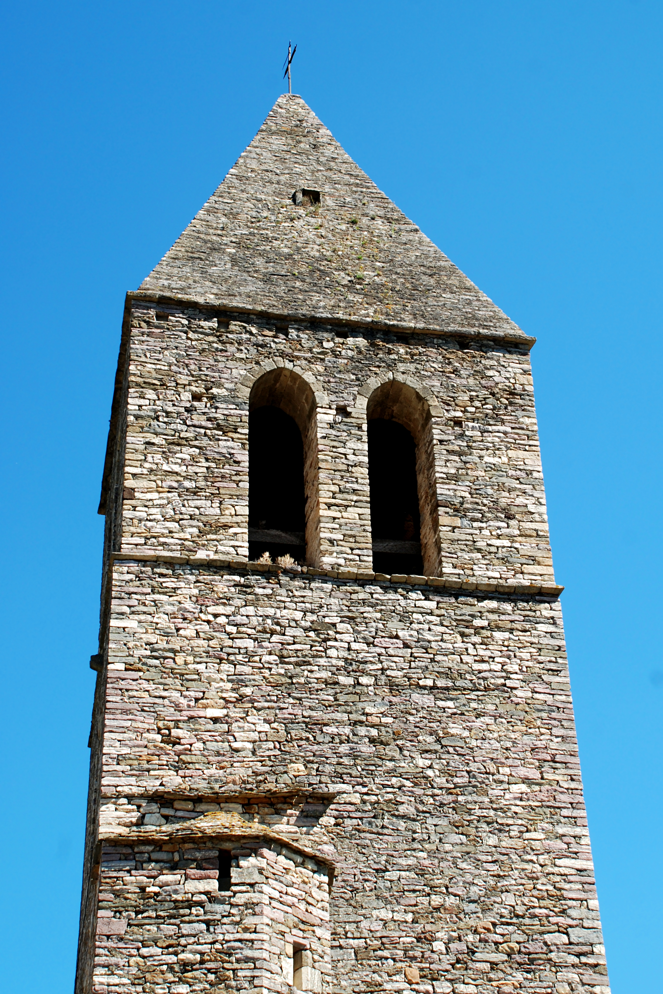 France - Languedoc - Hérault - Olargues - Église Saint-Laurent .